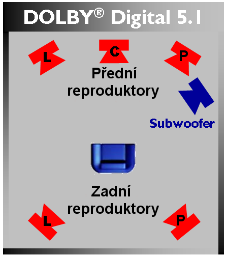 Vytvořeno editací obrázku